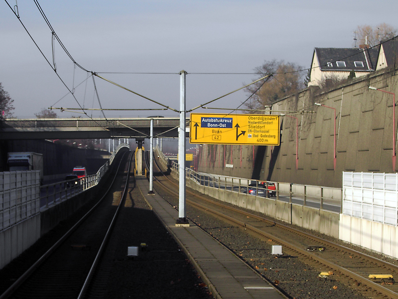 Bundesstraße 42 bei Königswinter-Oberdollendorf: Die als gelbe Autobahn ausgebaute Bundesstraße verläuft hier im Trog, im Mittelstreifen verläuft die Stadtbahntrasse der Siebengebirgsbahn.